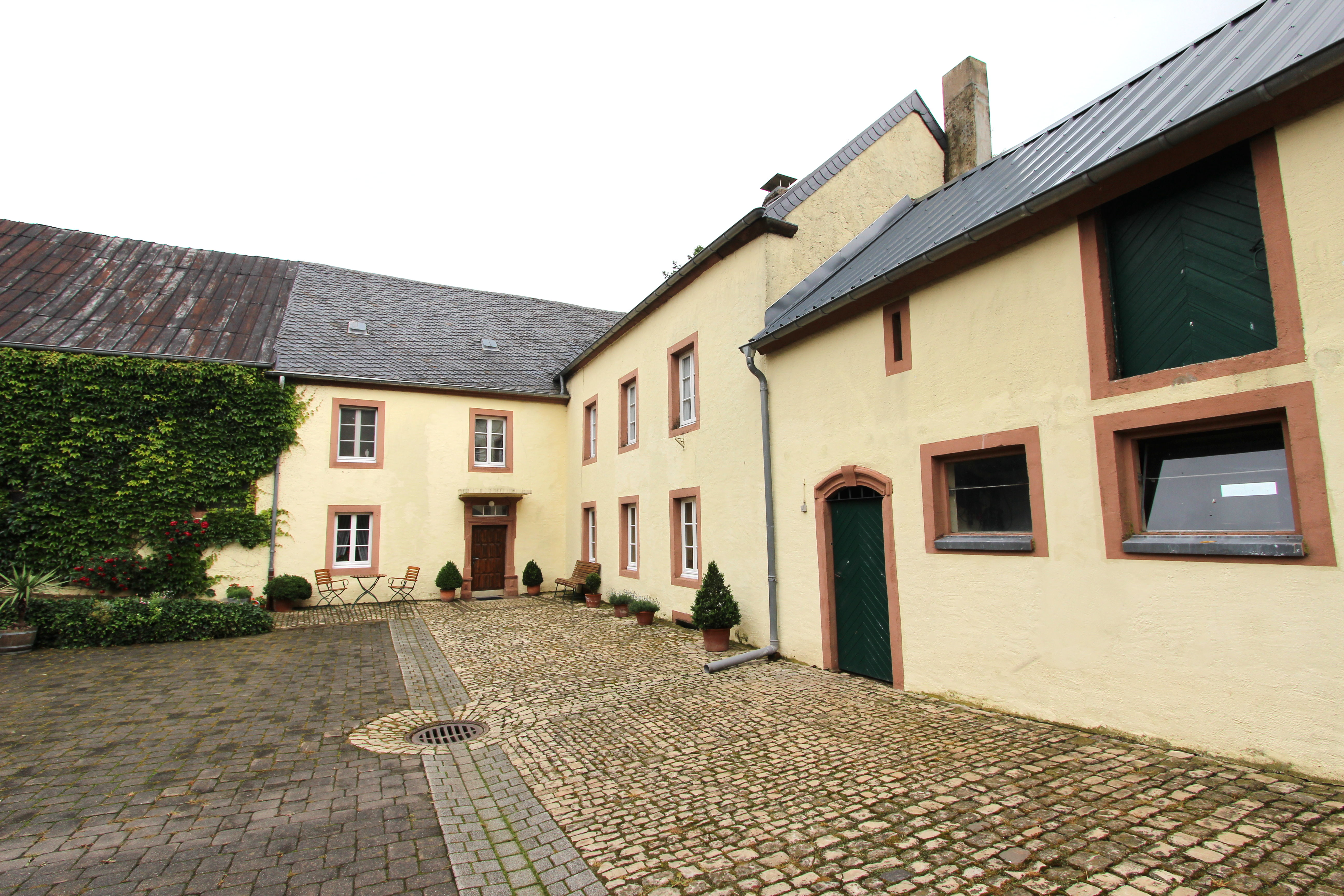 54646 Hisel (Eifel); Dorfstraße 3. Dreiseitige Hofanlage mit jüngeren Wirtschaftsgebäuden. Wohnhauserweiterung 1859. Aufnahme aus Süden von 2016.